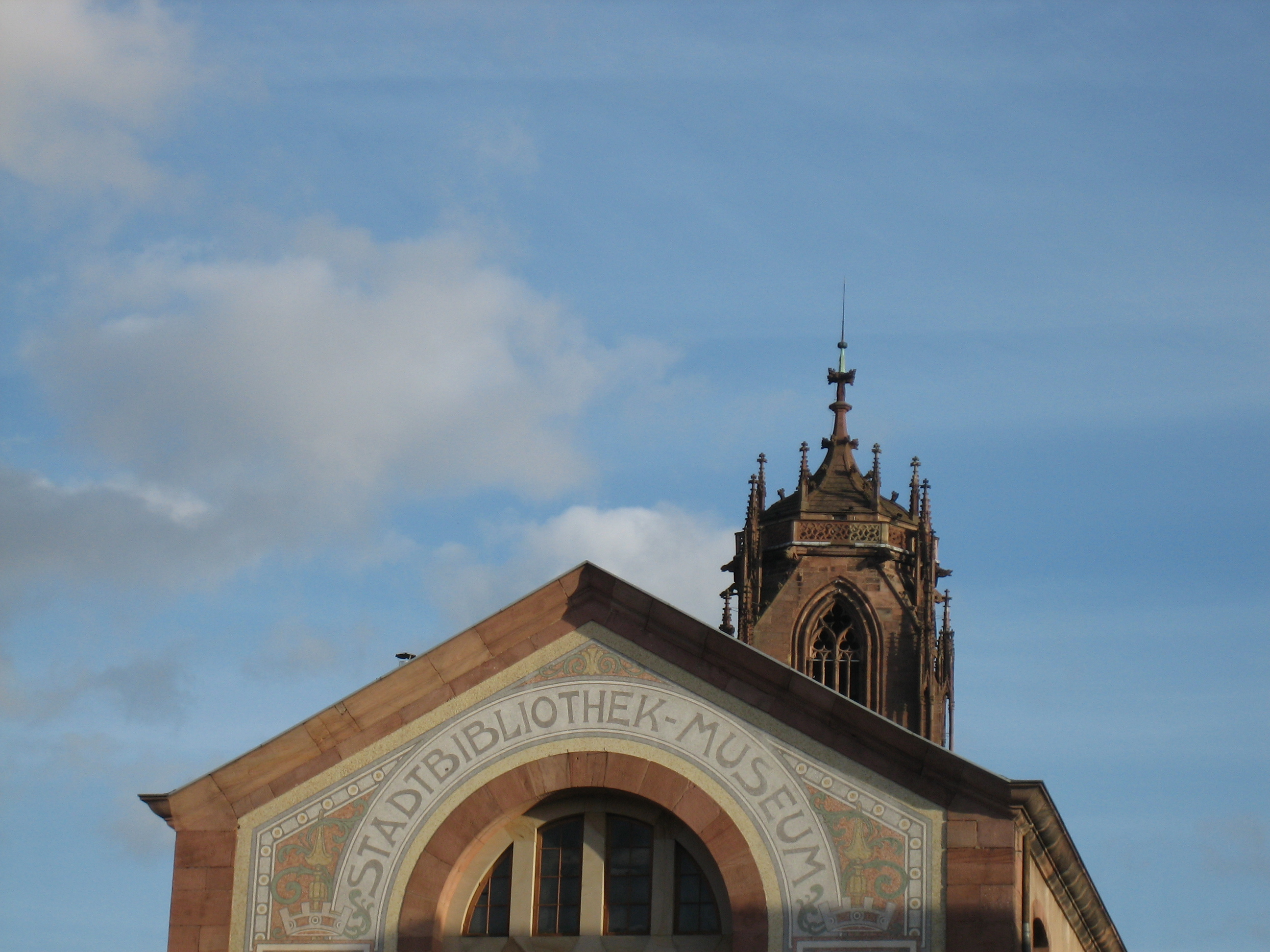 Le dessus de la bibliothèque humaniste de Sélestat, en fond l'église Saint-Georges (France)